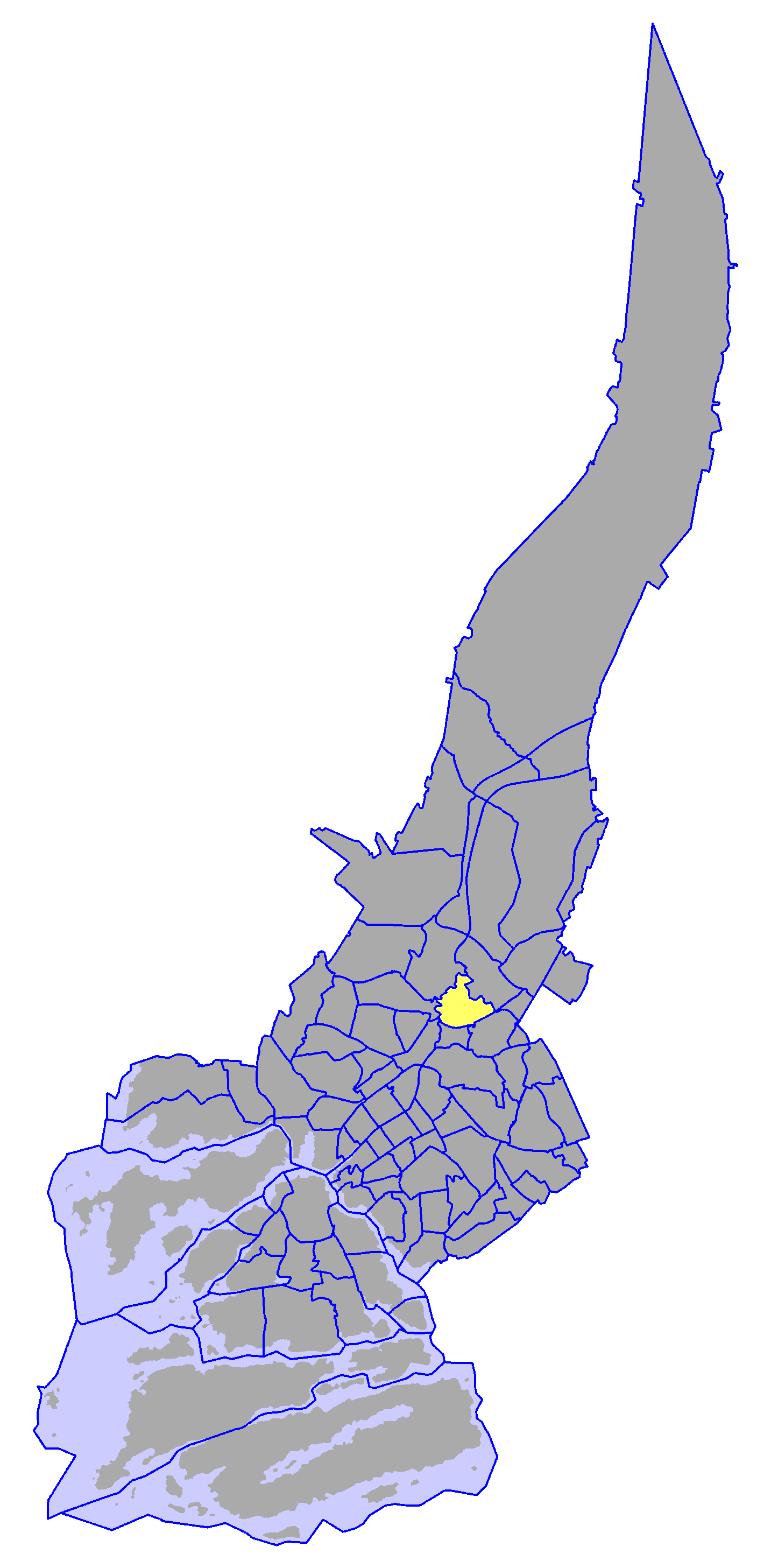 District of Räntämäki, in Turku